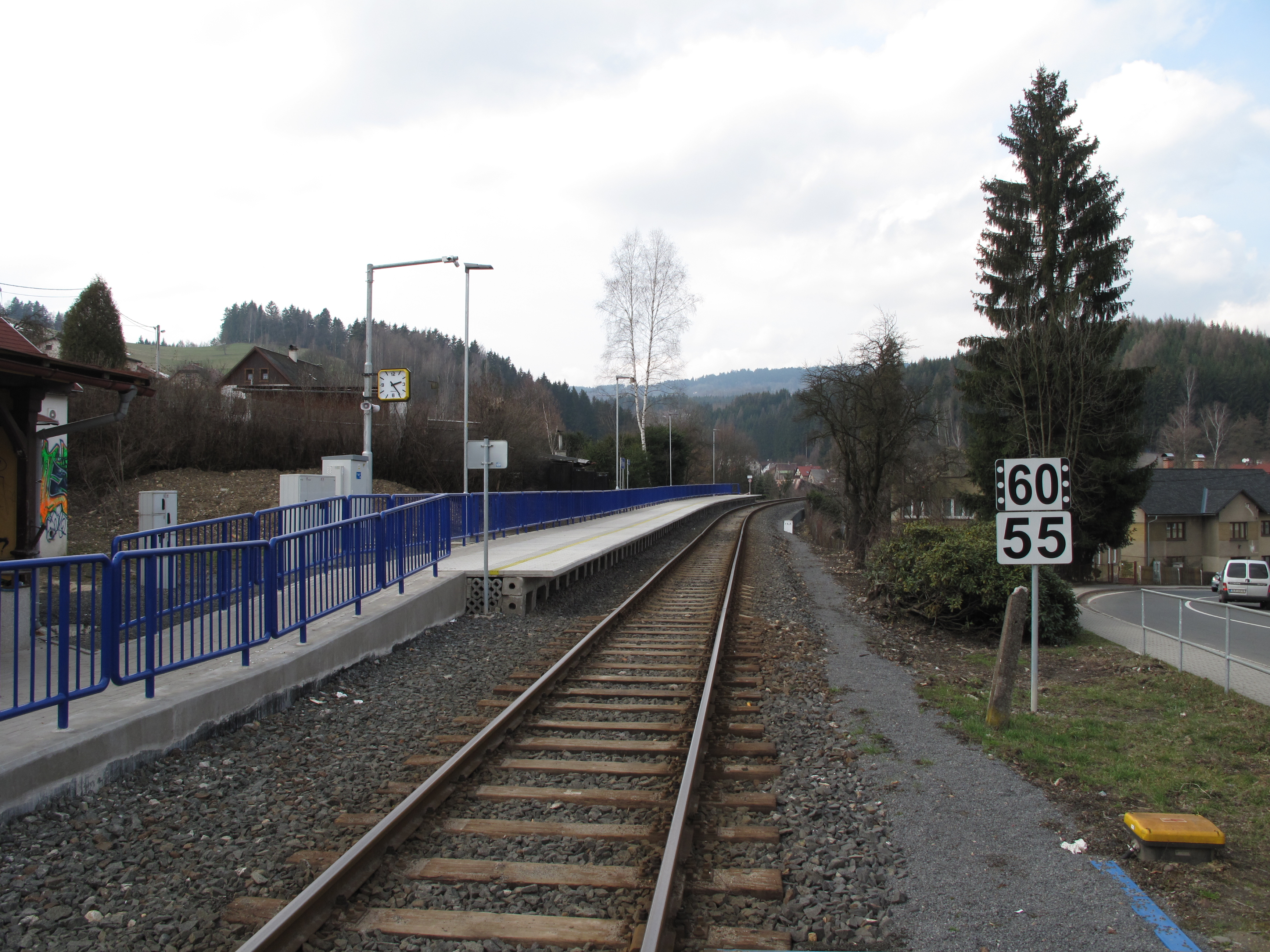 Železniční stanice v Plavech. Okres Jablonec nad Nisou, Česká republika.